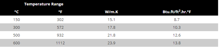 هدایت